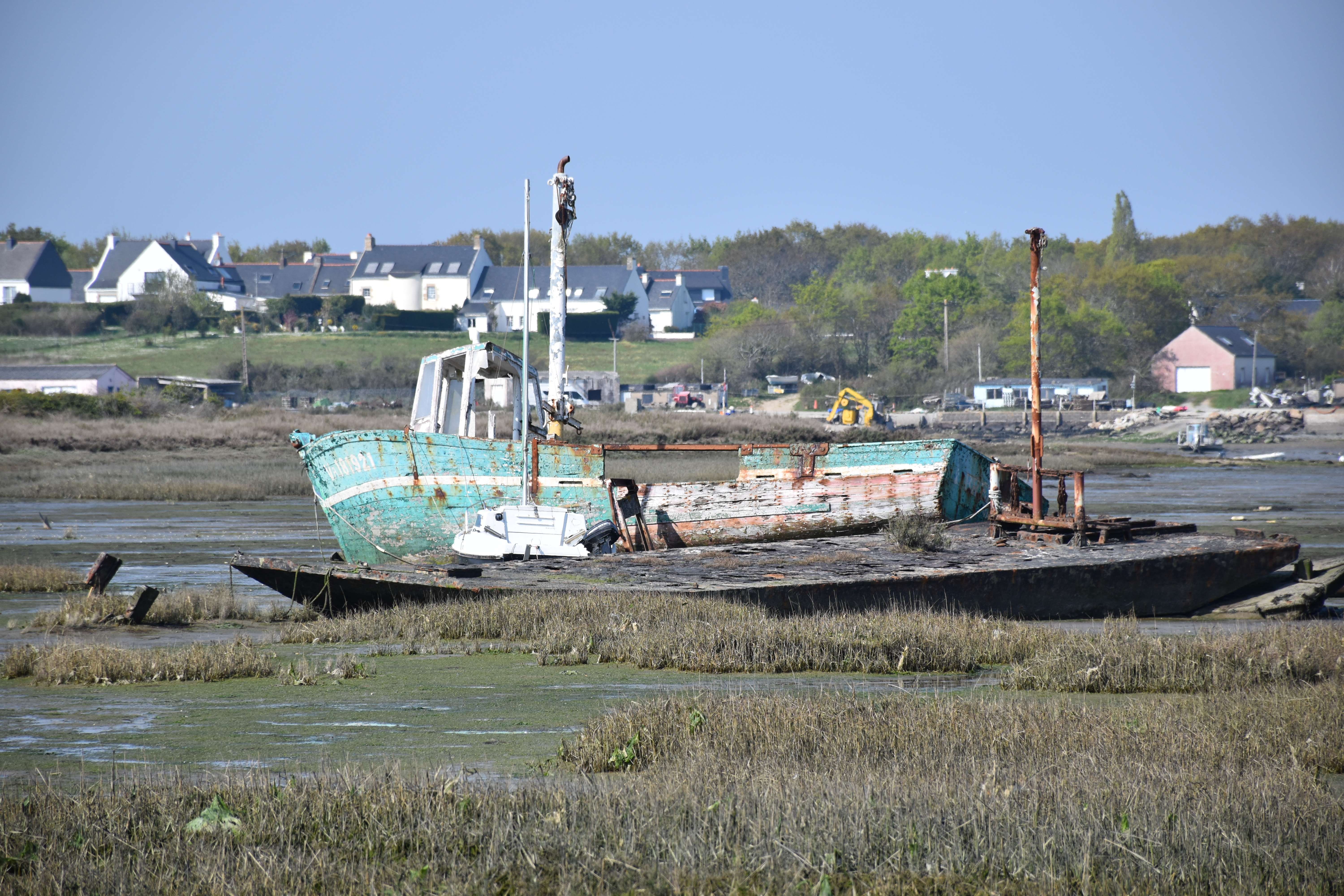 Île de Boëd - Cimetière de bâteaux